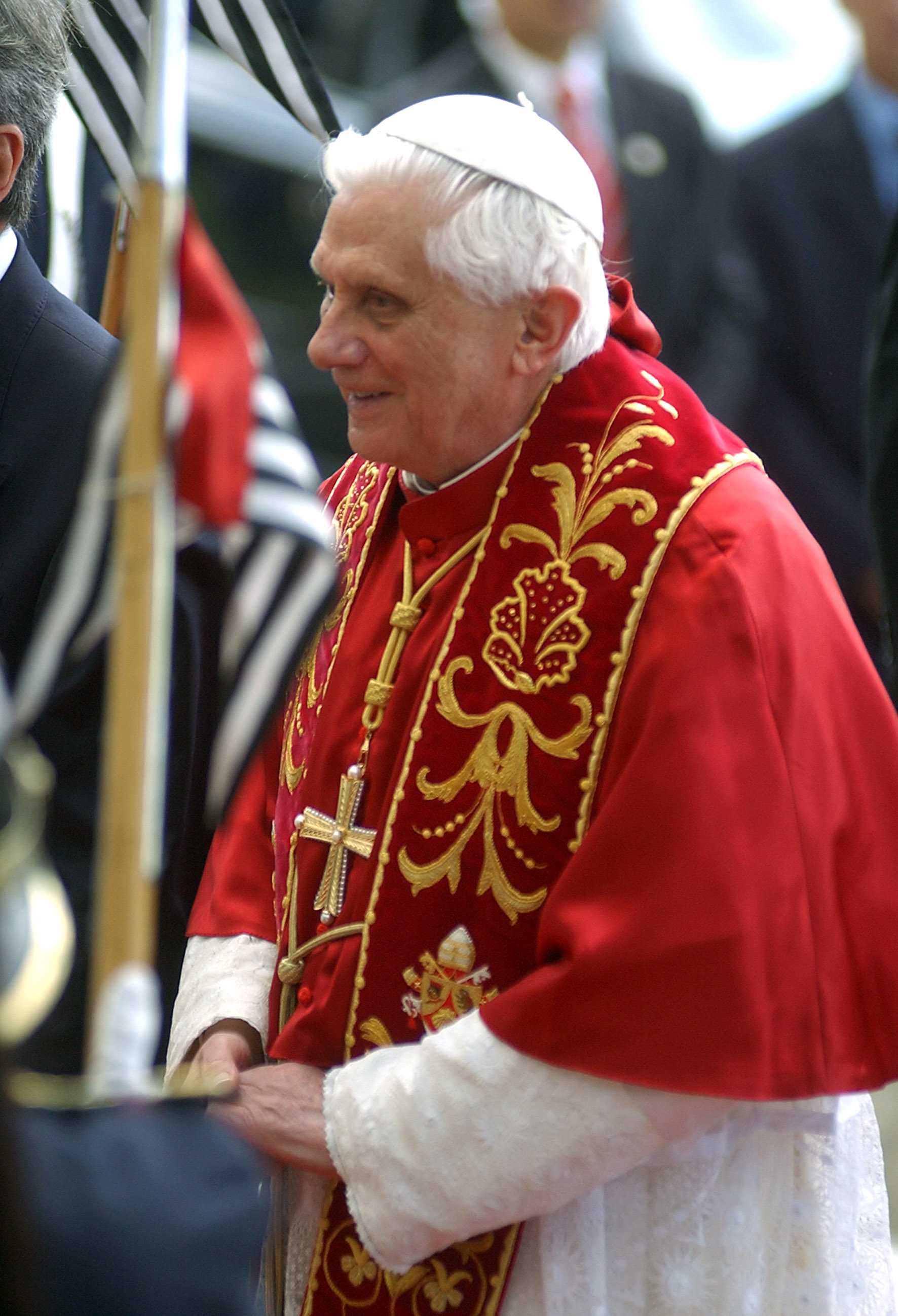 Papa Bento XVI chega ao Palácio dos Bandeirantes, residência oficial do governador do estado de São Paulo.